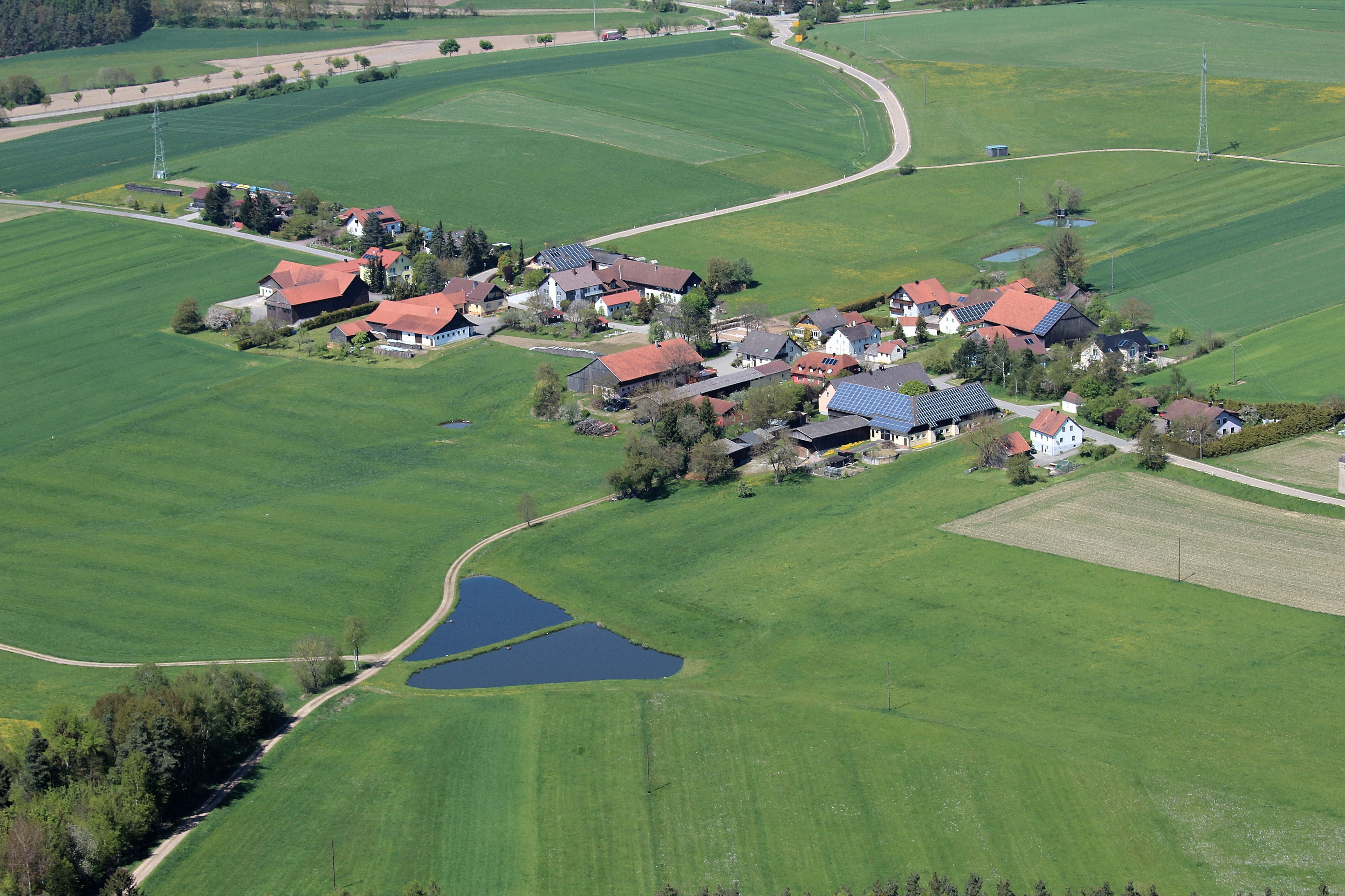 Pissau, Stadt Neunburg vorm Wald; Landkreis Schwandorf, Oberpfalz, Bayern